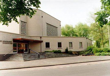 Licensed under the GFDL by the author.